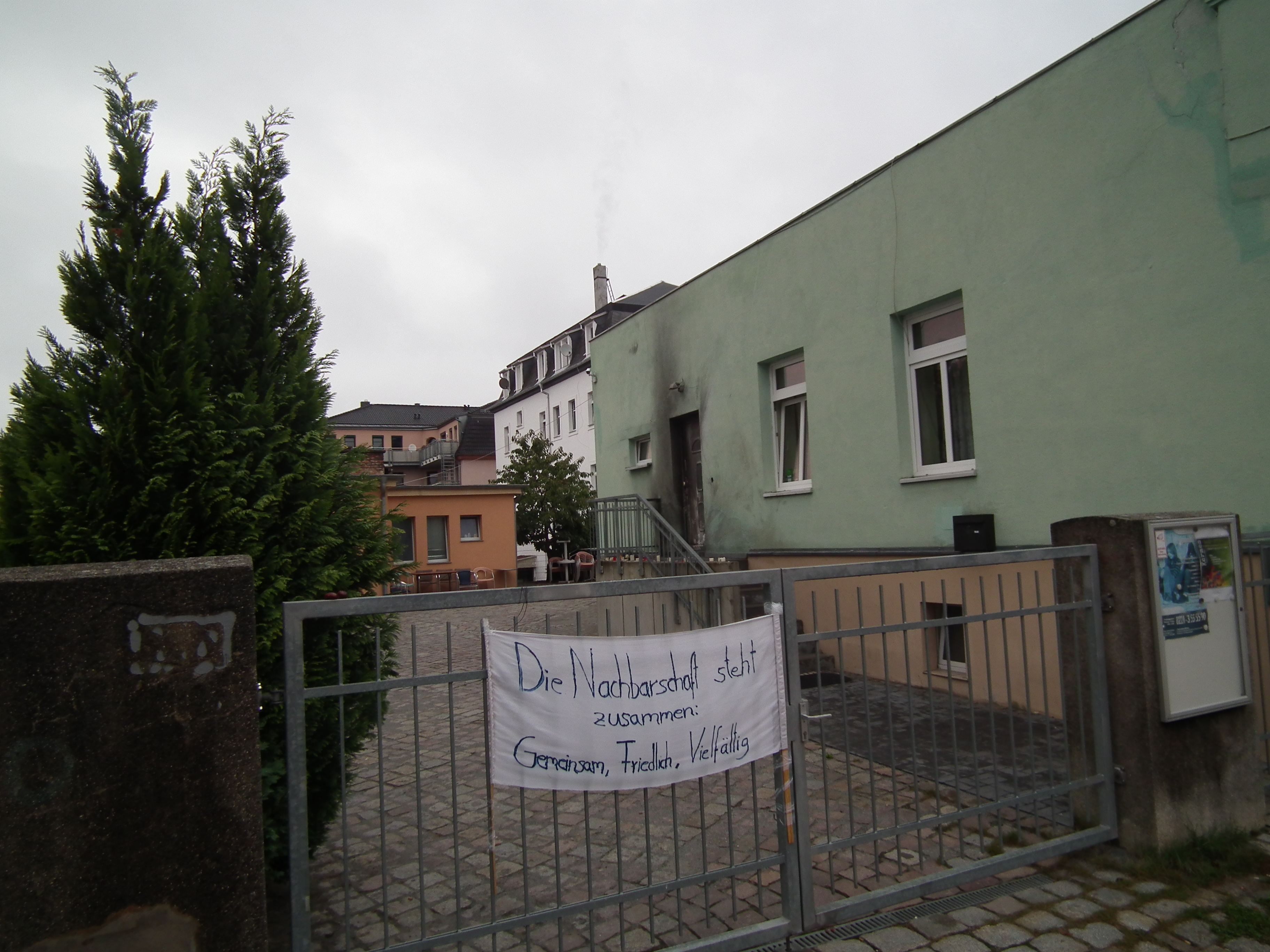 Fatih Camii Moschee Dresden